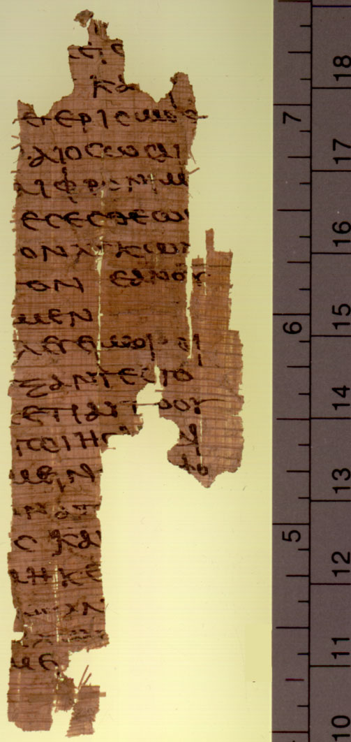 Papiro Oxy. LX 4009, forse frammento del vangelo di Pietro, Sackler Library, Oxford